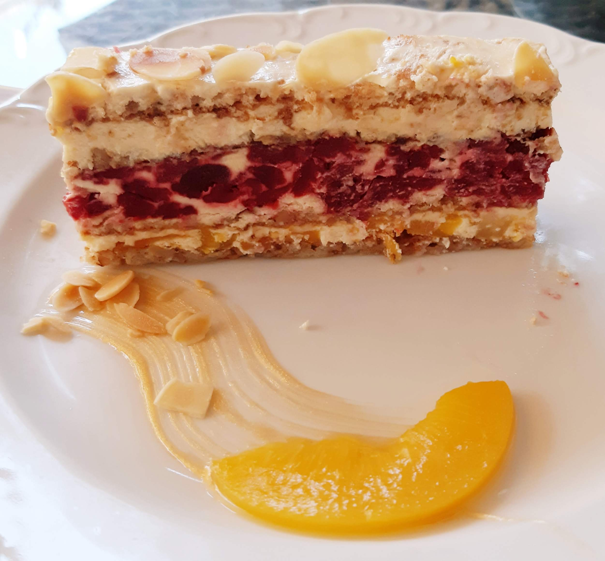 Moskva šnit